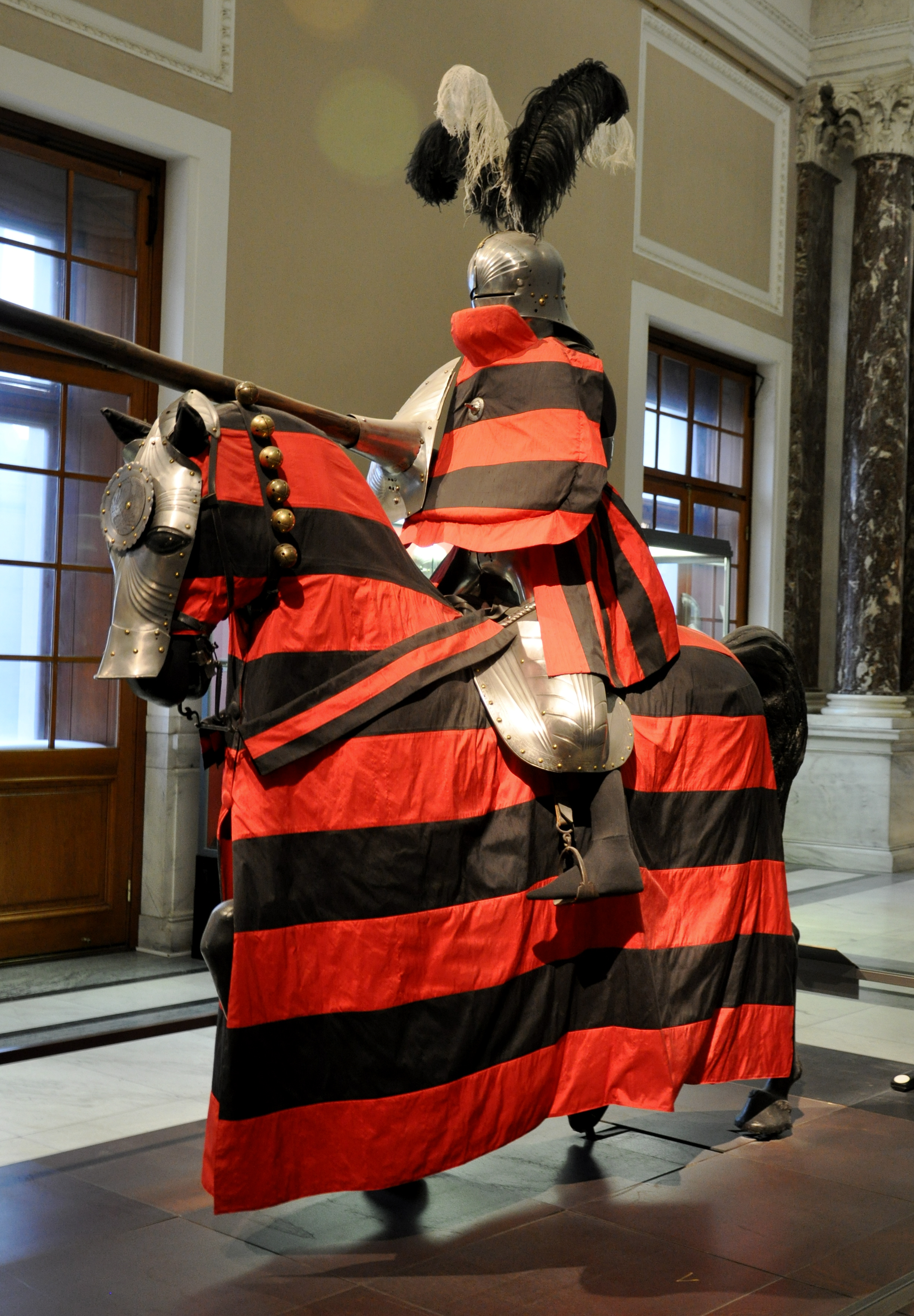 Wien, Kunsthistorisches Museum, Hofjagd- und Rüstkammer (Neue Burg) Rennzeug Kaiser Maximilian I., von Jörg Treytz, Innsbruck (erwähnt 1466-99), um 1485–1590